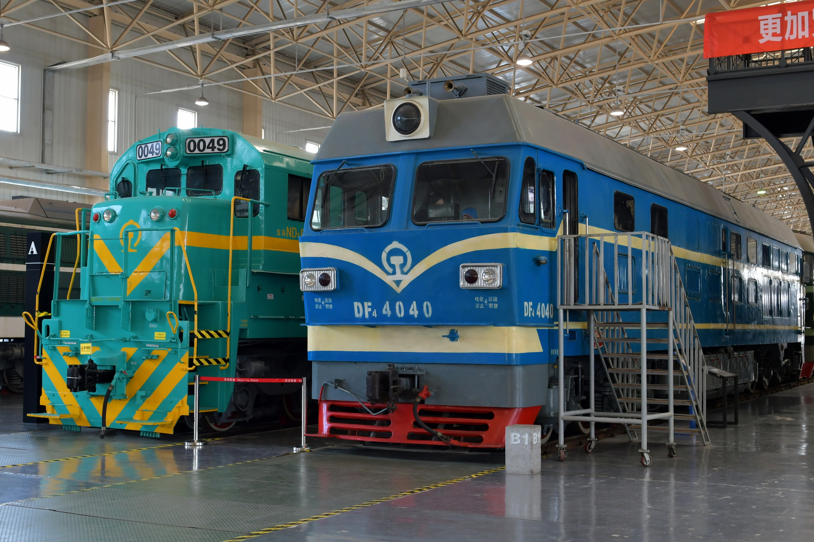 保存在中国铁道博物馆的东风4C型4040号机车和 ND5型0049号机车